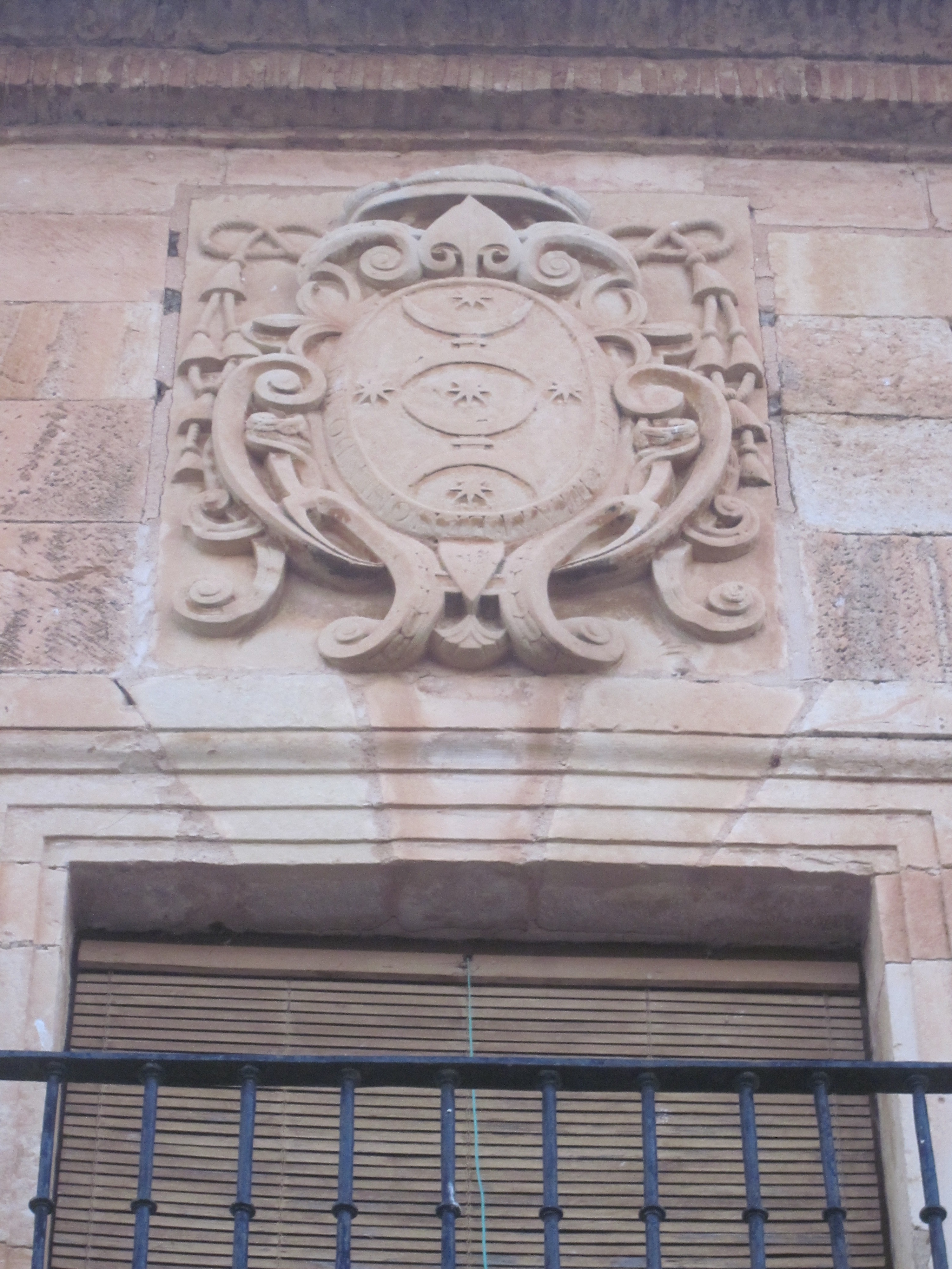 Escudo del Obispo Don Juan de Cuenca. Puebla de Almenra